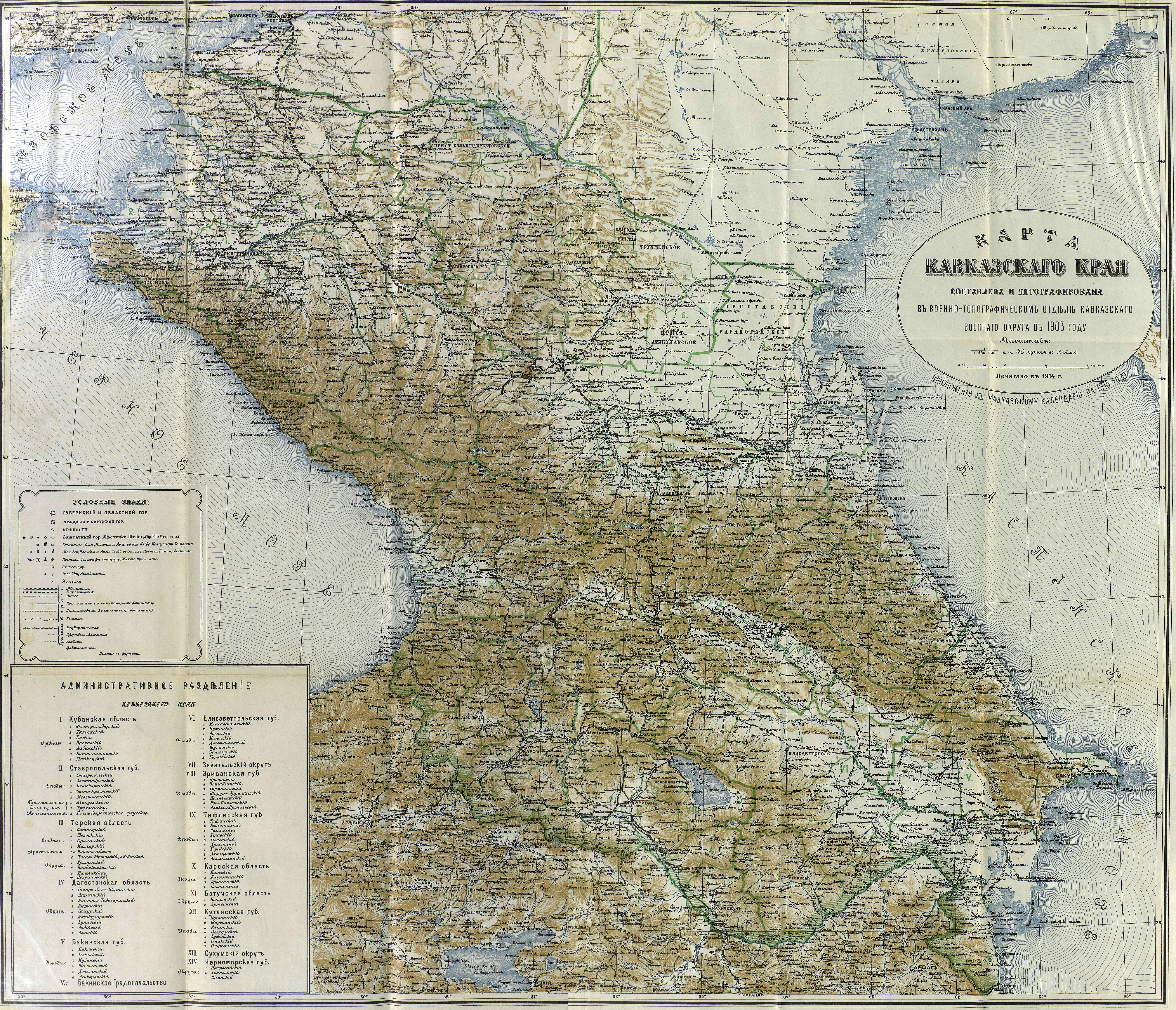 Карта Кавказского края 1903 года.